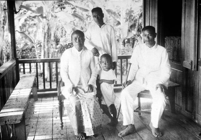 Repronegatief. Deze foto is gemaakt tijdens de Talaud, Morotai en Tidore Expeditie van 1926.. Kapitein Laot van Beo (Talaud) met zijn familie